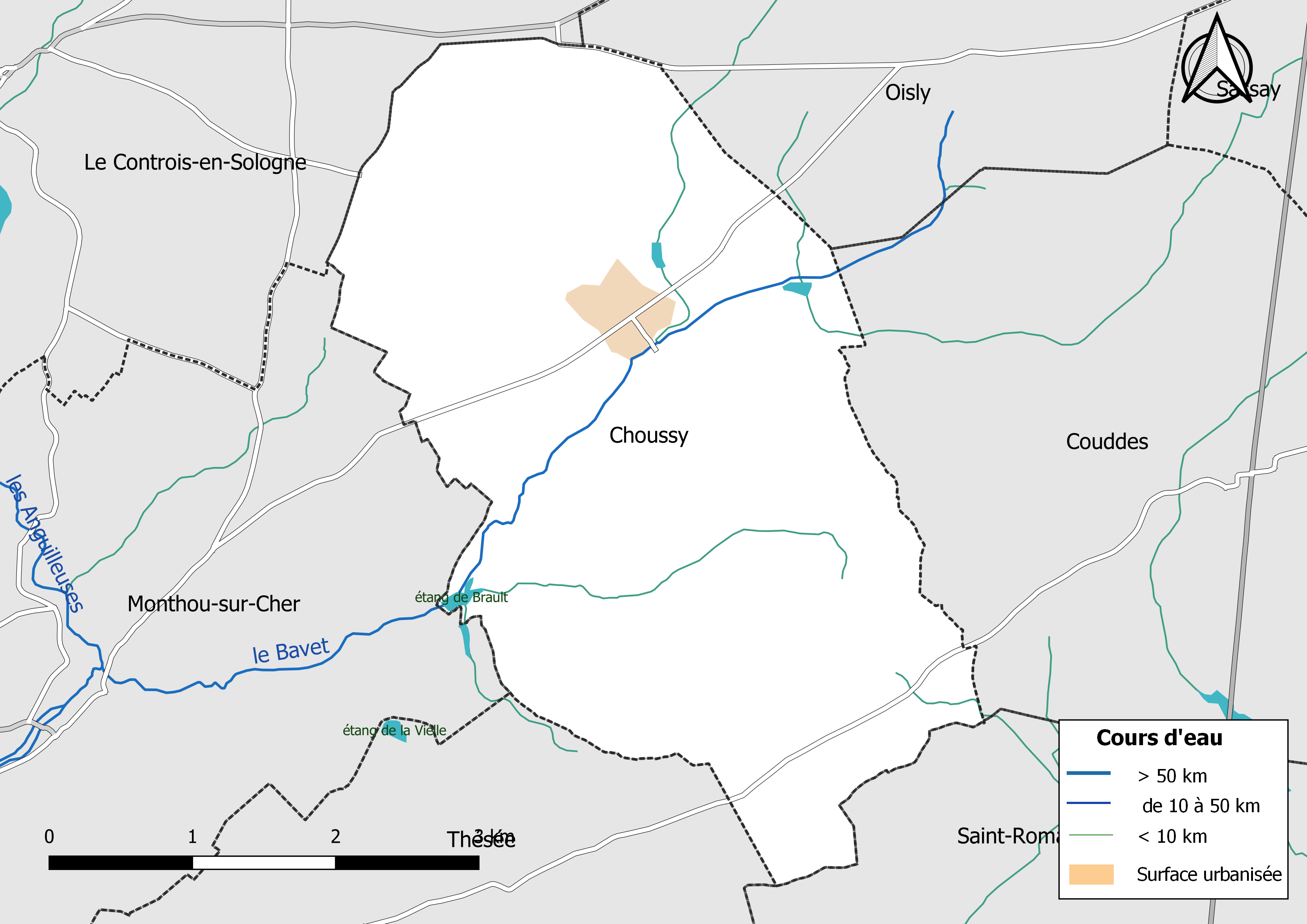 Carte du réseau hydrographique de la commune de Choussy (Loir-et-Cher, France).